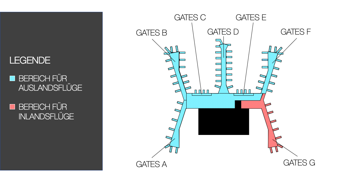 Eine Zeichnung mit den zwei Terminalbereichen (Inland und Ausland) und den Gate-Bereichen